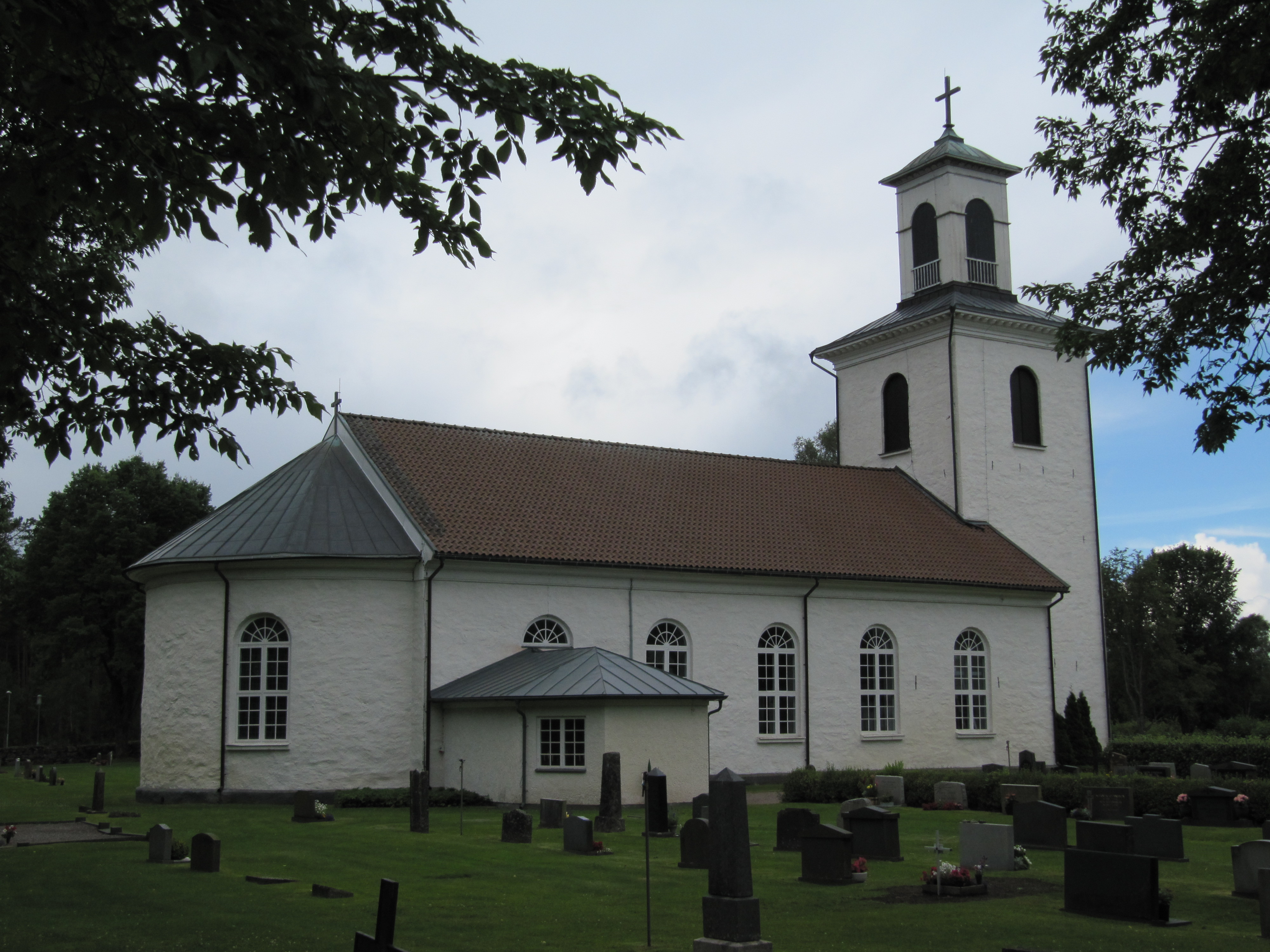 Nittorps kyrka från nordost